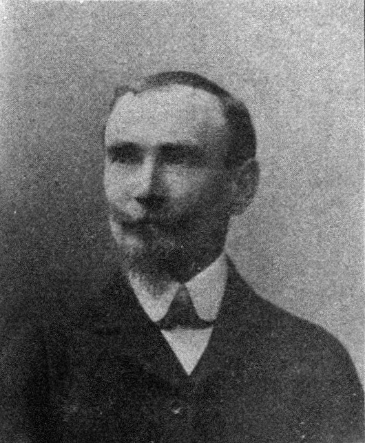 Österreichischer Politiker, Reichsratswahl 1907, Name siehe Dateiname